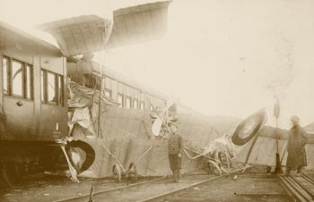 Обломки самолёта «Фарман 22» после авиакатастрофы в Гатчине. В аварии погиб лётчик Христофор Францевич Пруссис